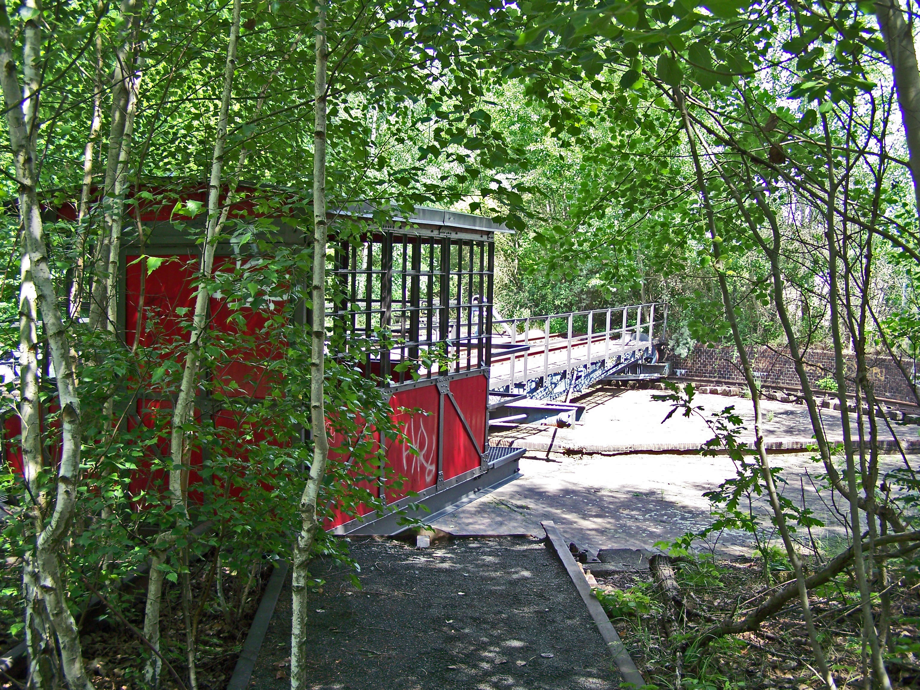 Drehscheibe im Naturpark Südgelände auf dem Gebiet des ehemaligen Bahnhofes Berlin-Tempelhof Rbf